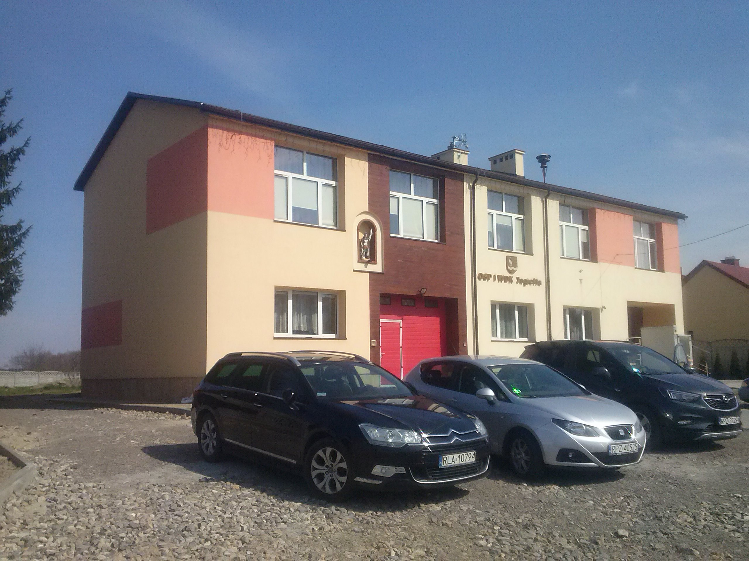 Wiejski Dom Kultury i remiza OSP w Jagielle